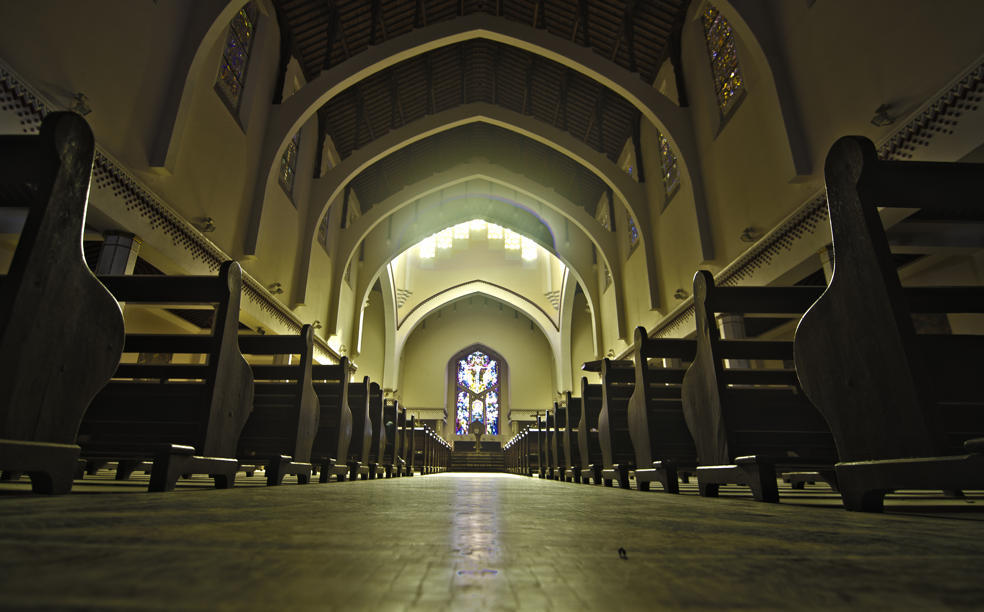 un samedi après midi, un mec à moitié allongé sur le sol au milieu de la cathédrale de Rabat et hop... le tour est joué ! pas mal, finalement.